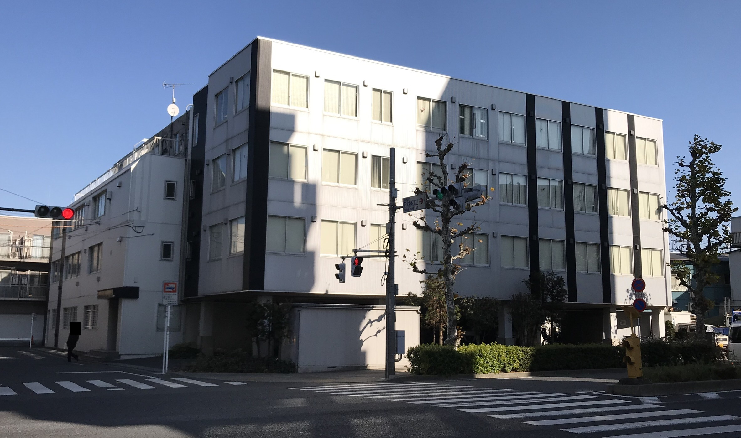 アニメイト本社